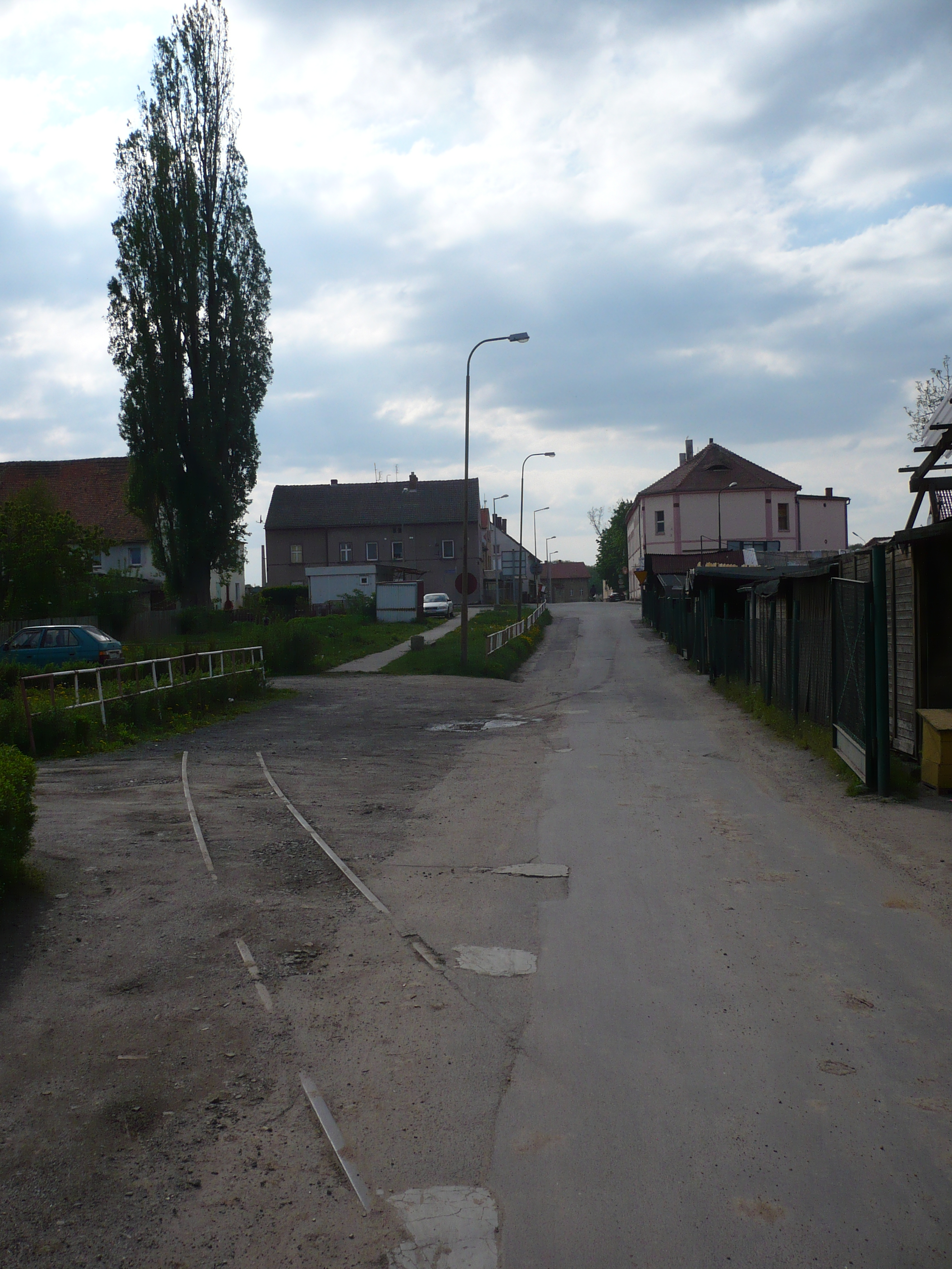 Zbytky úzkorozchodné dráhy v Sieniawce, Polsko